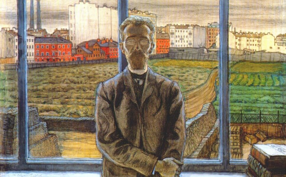 Человек в очках. Портрет художественного критика и поэта Константина Суннерберга. 1905